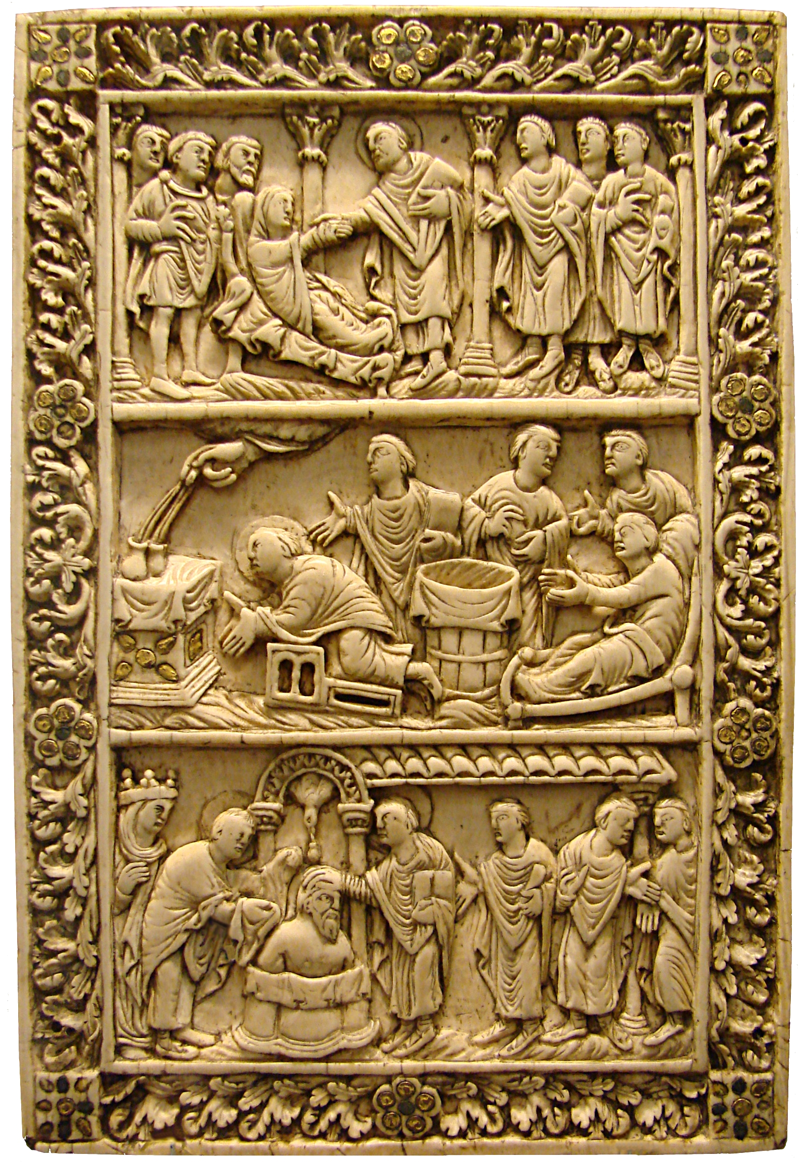 Plaque de reliure en ivoire, Reims, dernier quart du IXème siècle. Musée de Picardie à Amiens. Scènes de la vie de St Remi : au registre supérieur, St Remi ressuscite une jeune fille ; au centre : la Main de Dieu remplit deux flacons ; au registre inférieur, le baptême de Clovis avec le miracle de la Sainte Ampoule.